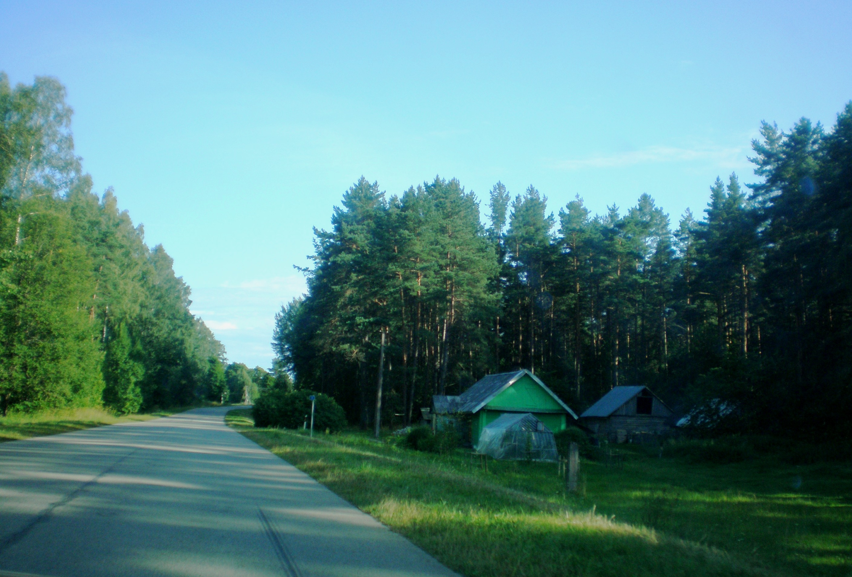 Liaudėnai, Zarasų raj., Lietuva